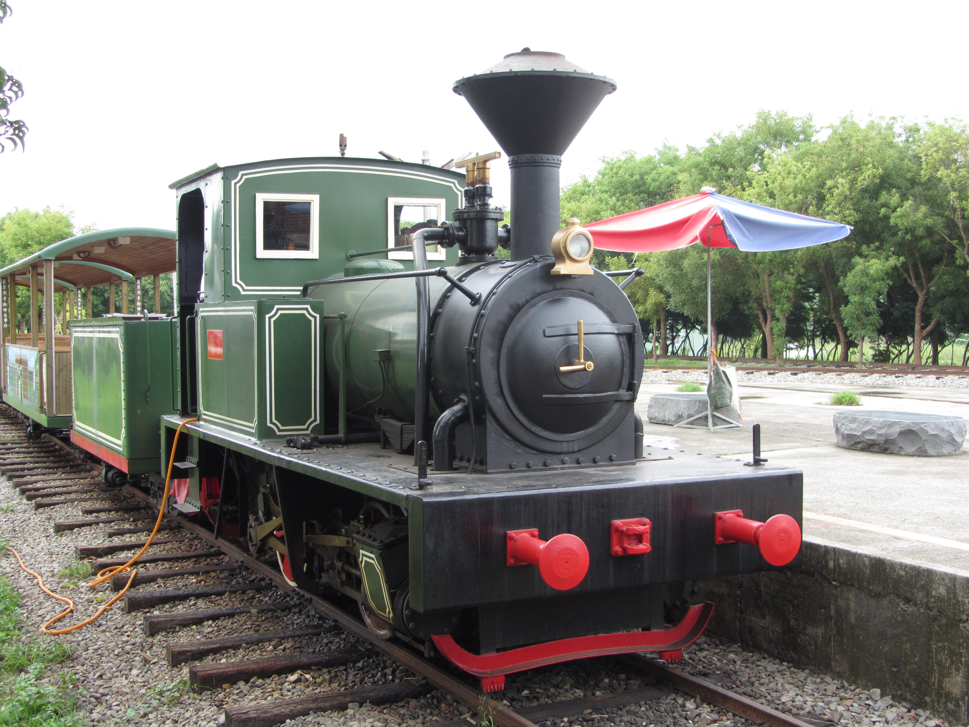 中文（台灣）: 台中市東勢客家文化園區的複製版騰雲號。